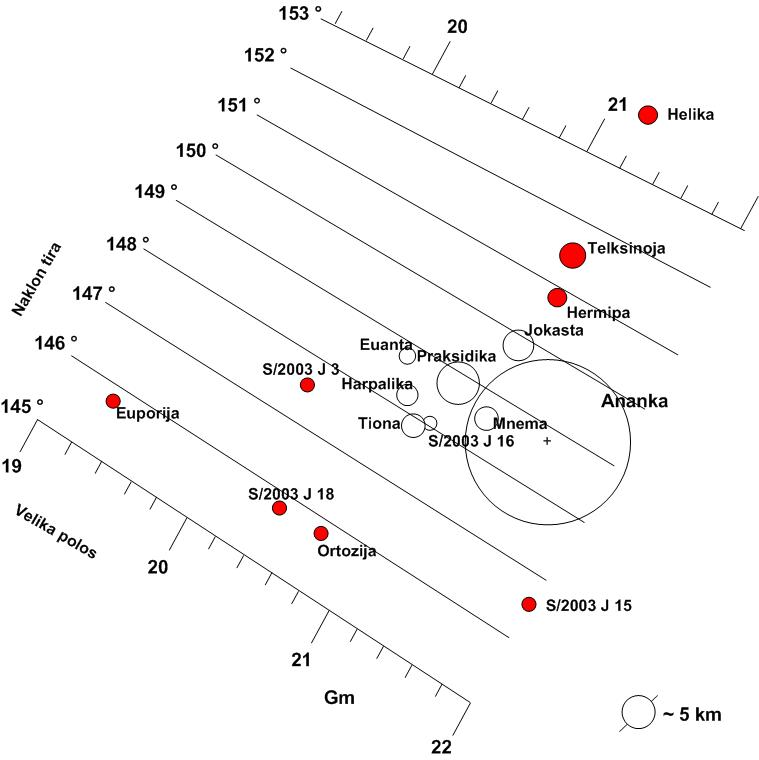 Na diagramu so prikazani položaji vseh članic Anankine skupine Jupitrovih lun v polarnih koordinatah: na eni osi je oddaljenost od Jupitra v Gm na drugi osi je naklon tirnice Rdeče so označene članice obrobja skupine, belo so označene članice jedra skupine. Vir podatkov Elementi tirnic: JPL (Avgust 2006). Velikost teles: Sheppard-ove strani (Avgust 2006) Izdelano z orodjem: Microsoft® Office Visio® Standard 2003.